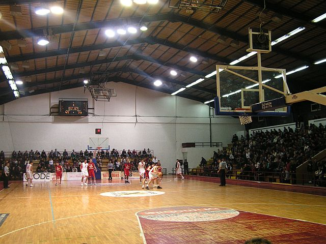 Dvorana Bilimišče u Zenici